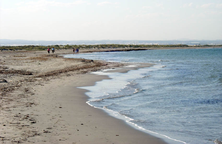 Playa de punta de algas